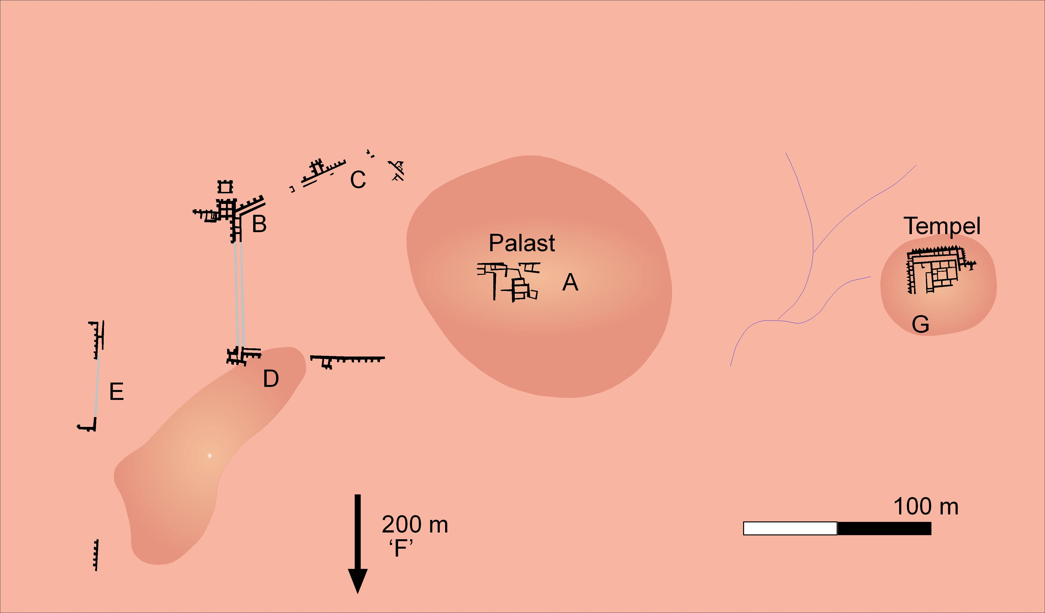 Mundigak, Stadtplan der Schicht IV, nach Casal: Fouilles de Mundigak, Paris 1961, fig. 21